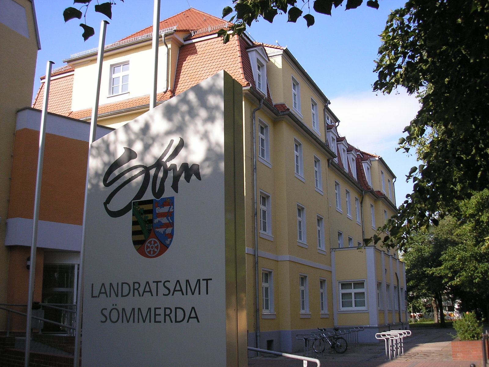 Landratsamt des Landkreises Sömmerda in Sömmerda (Thüringen).